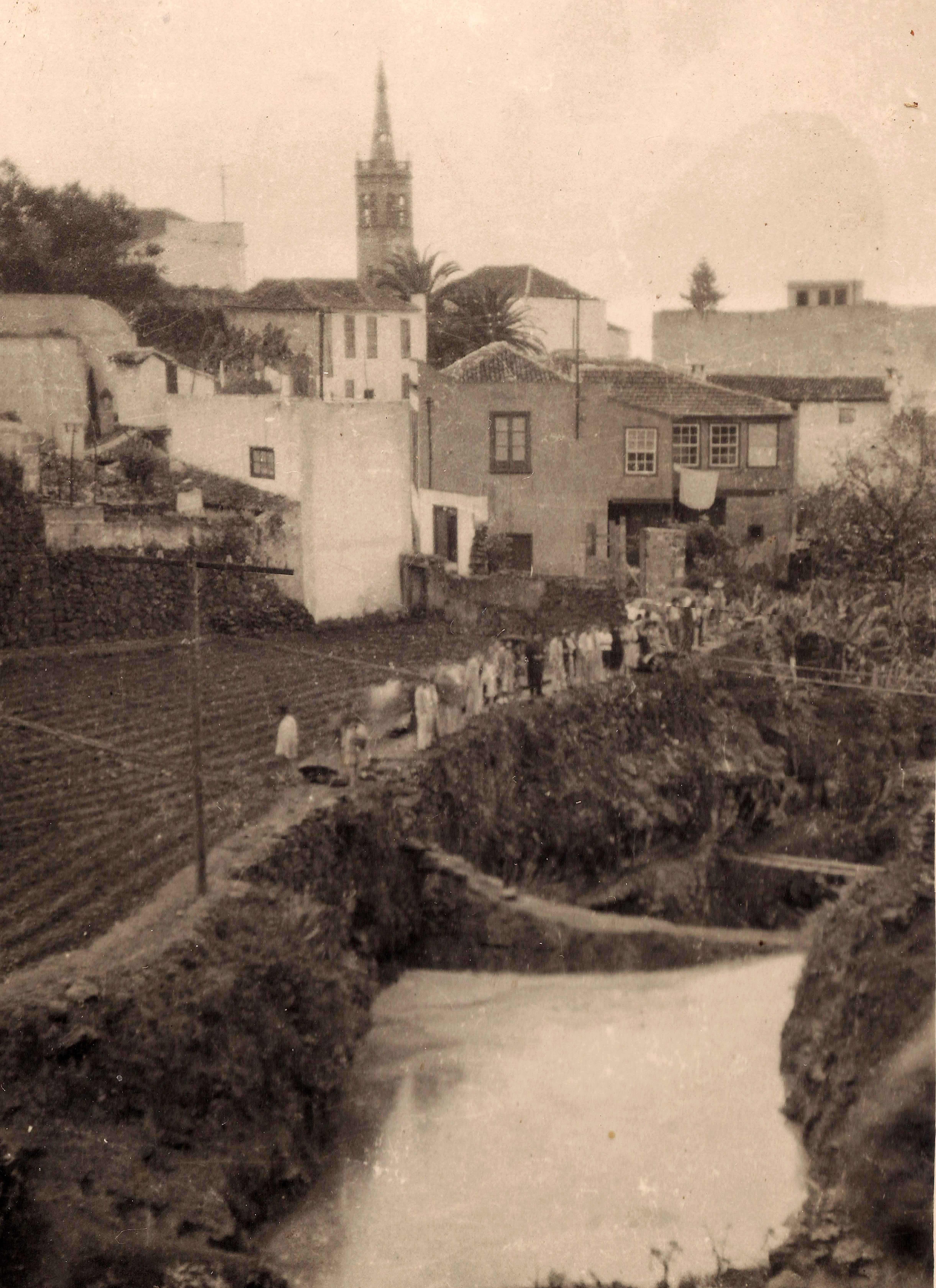 Vista del casto de Realejo Alto en el pasado siglo XX.